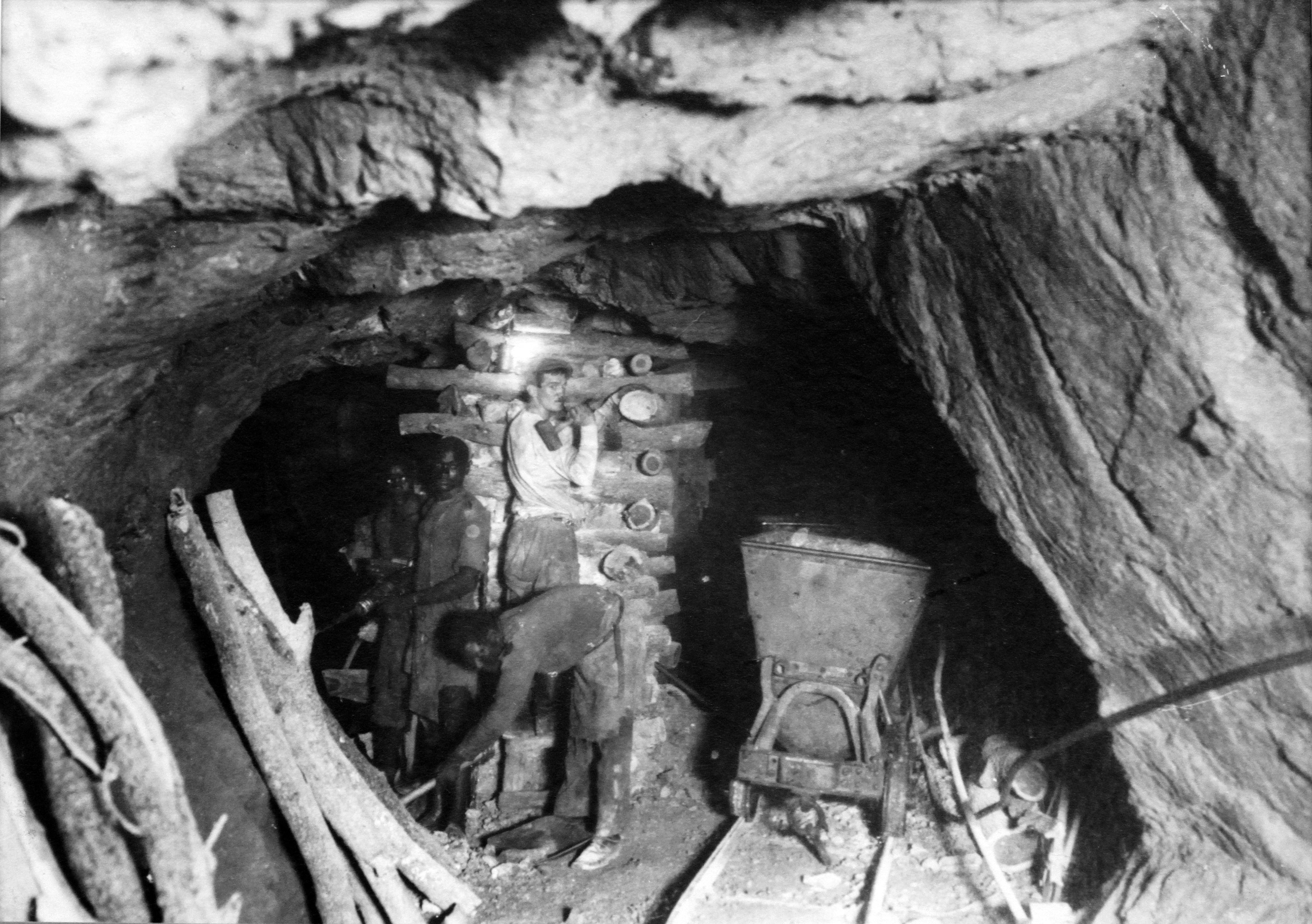 Tsumeb Bergwerk, Naibia: Einbau von Stempeln im Stollen